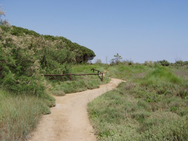 Pineta di Eracleamare di fronte alla Laguna del Mort, passeggiata fra la pineta e la laguna.